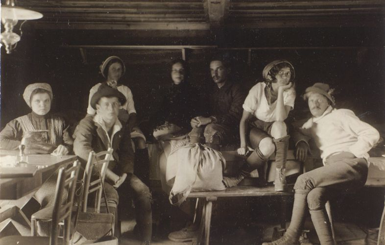 Miha Čop s skupino planincev v koči